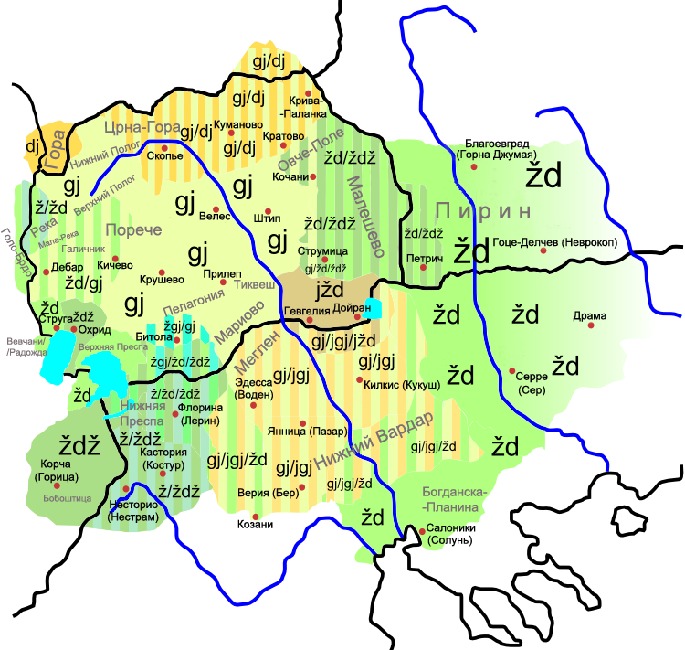 Область распространения континуанта праславянской *dj в македонском языковом ареале.